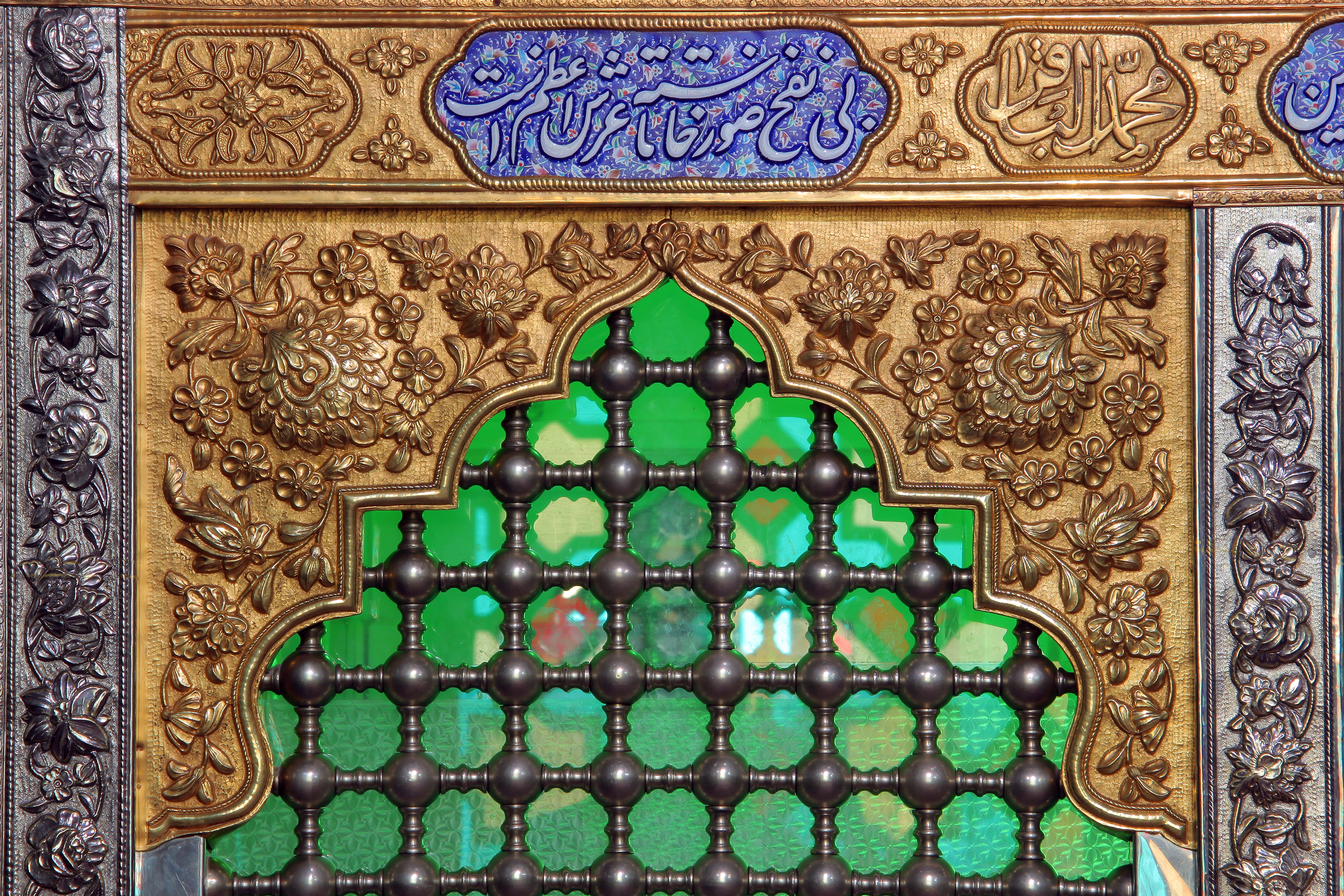 امامزاده شاه جمال در قم، ابتدای ورودی جاده اراک به شهرستان قم واقع شده و این اثر در تاریخ ۲۵ اسفند ۱۳۷۹ با شمارهٔ ثبت ۳۳۴۴ به‌عنوان یکی از آثار ملی ایران به ثبت رسیده است.